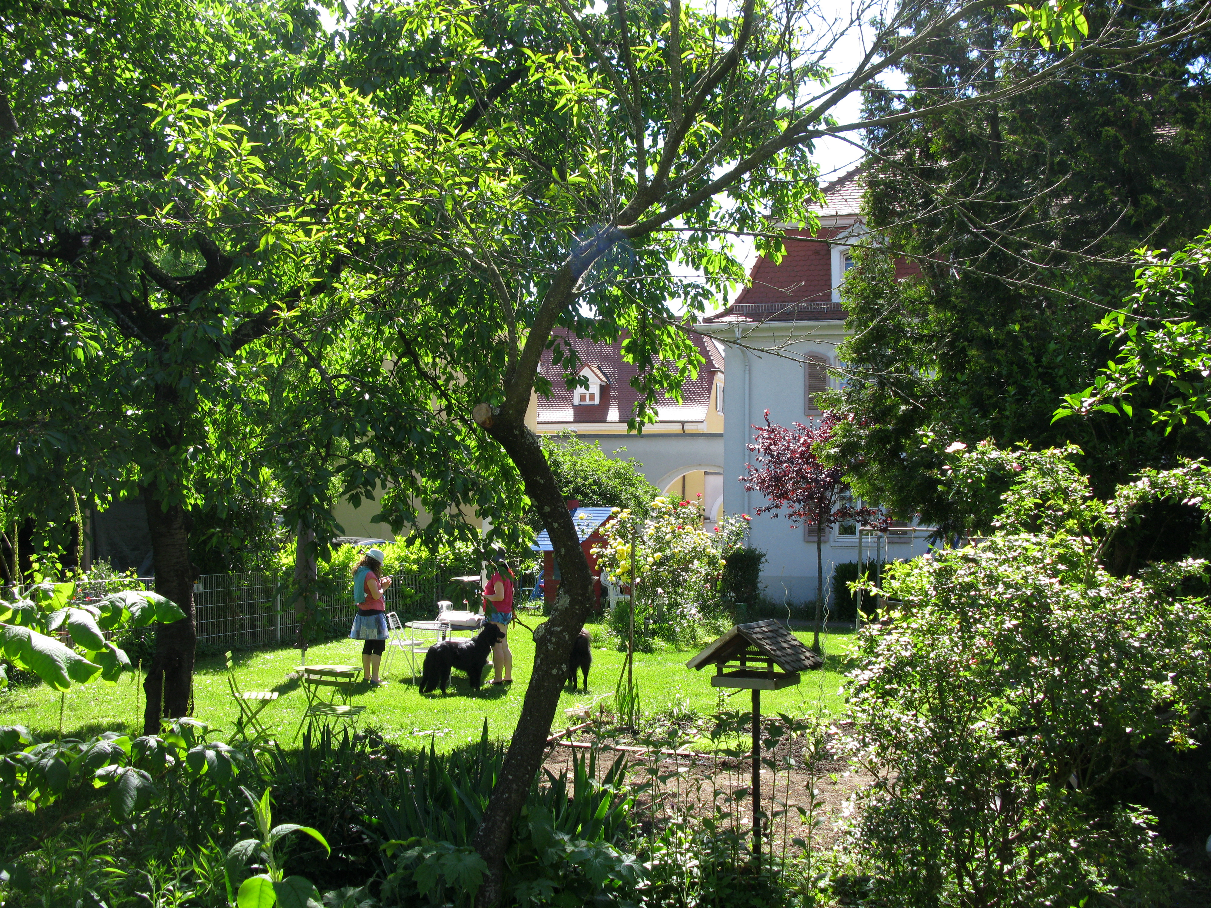 Gartenstadt Freiburg-Haslach